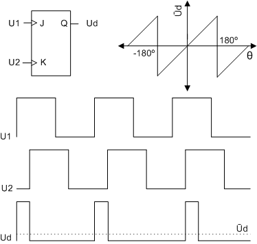 diagrama y gráficas del detector de fase de un PLL de tipo JK